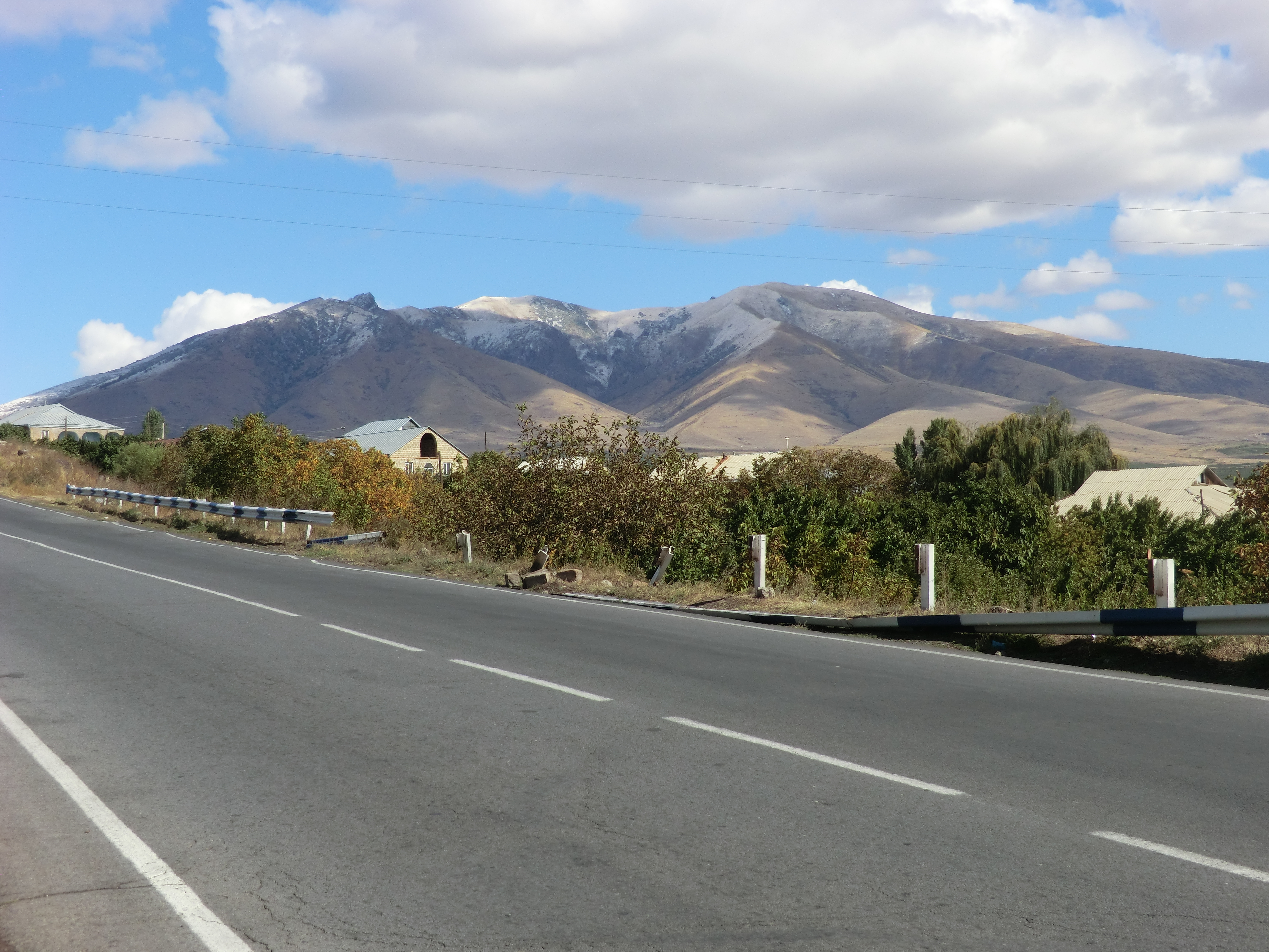 Route à Ohanavan.